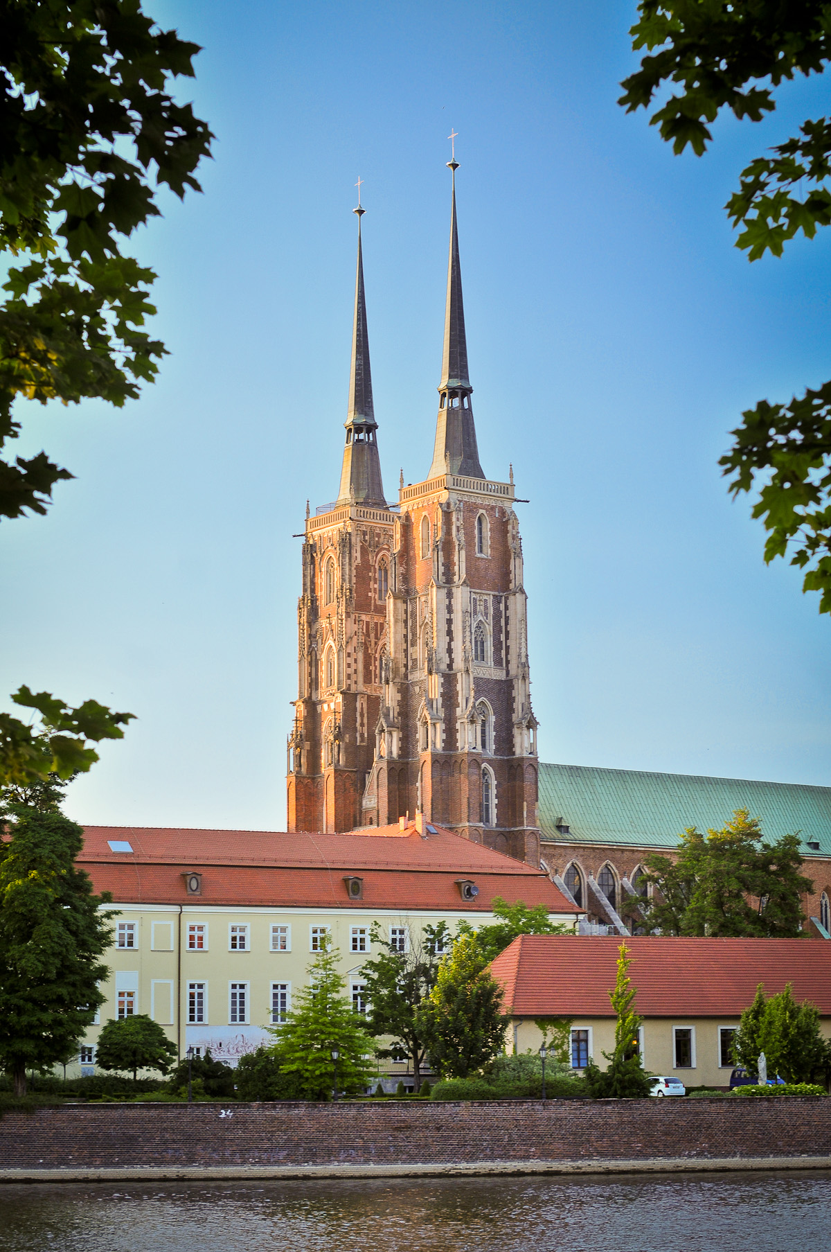 Widok na Katedrę św. Jana Chrzciciela we Wrocławiu z bulwaru Xawerego Dunikowskiego.